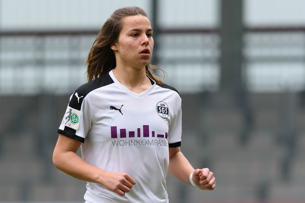 Lena Oberdorf at FC Bayern vs SGS Essen